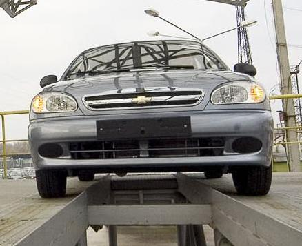 Осмотр автомобилей ZAZ-Sens на эстакаде в цеха сдачи Запорожского Автомобилестроительного Завода. Собственное производство.